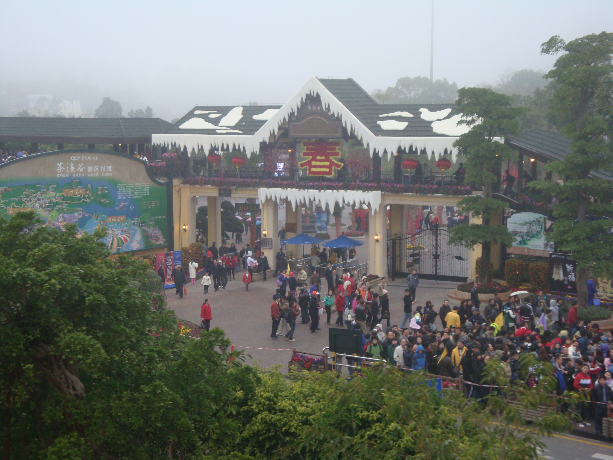 中文（中国大陆）: 深圳东部华侨城茶溪谷入口